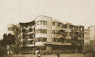 Первый жилой дом врача, г.Киев